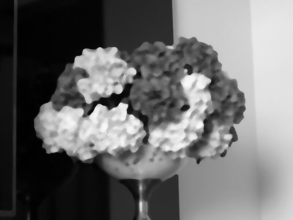 Tamanho da máscara - 3x